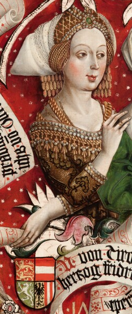 Eudokia Laskarina